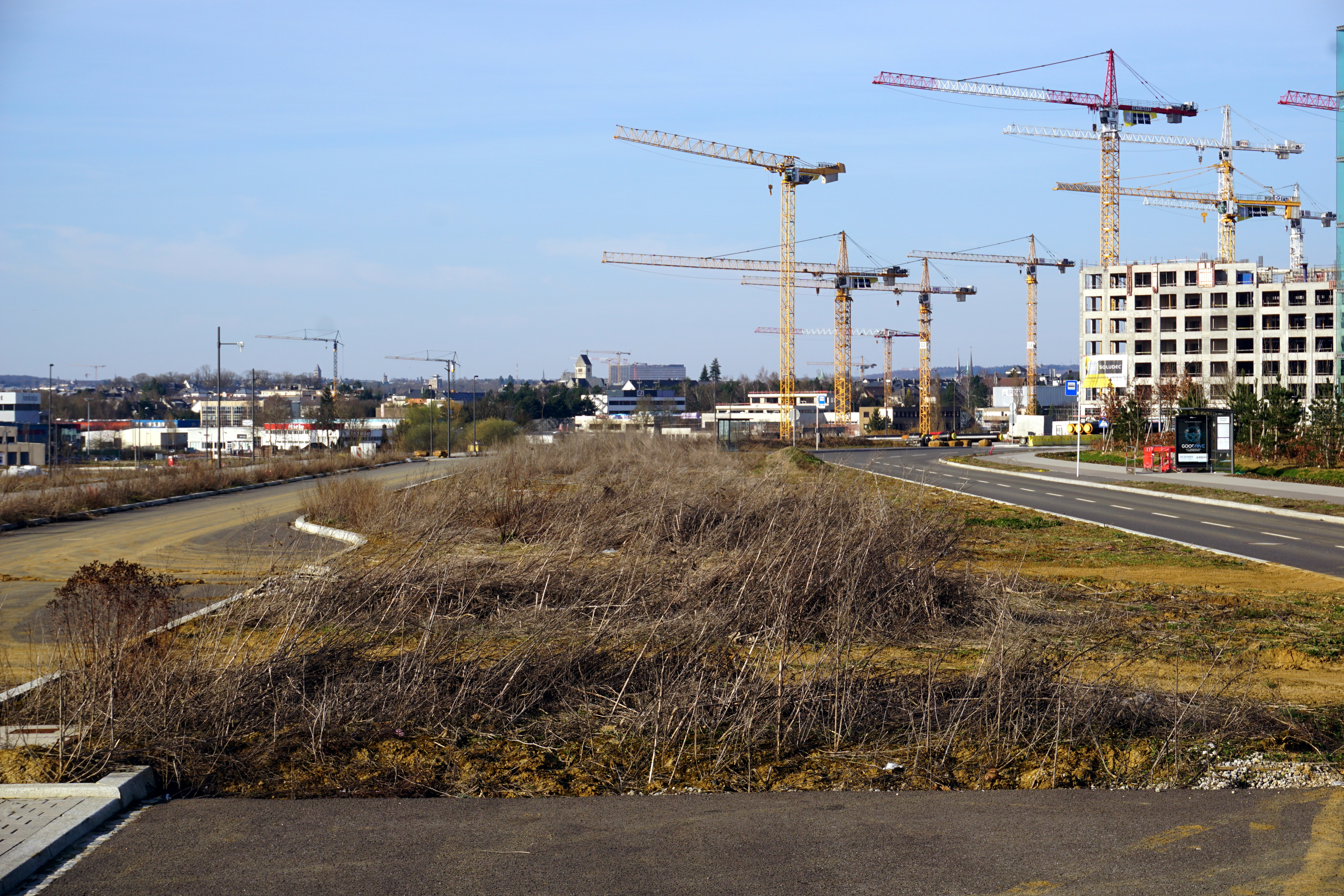 Le Boulevard de Kockelscheuer à Luxembourg, Gasperich. Vue depuis la rue Isaac Newton en direction nord: entre les voies est et ouest, sur la partie centrale, l'aire réservée pour le futur tramway